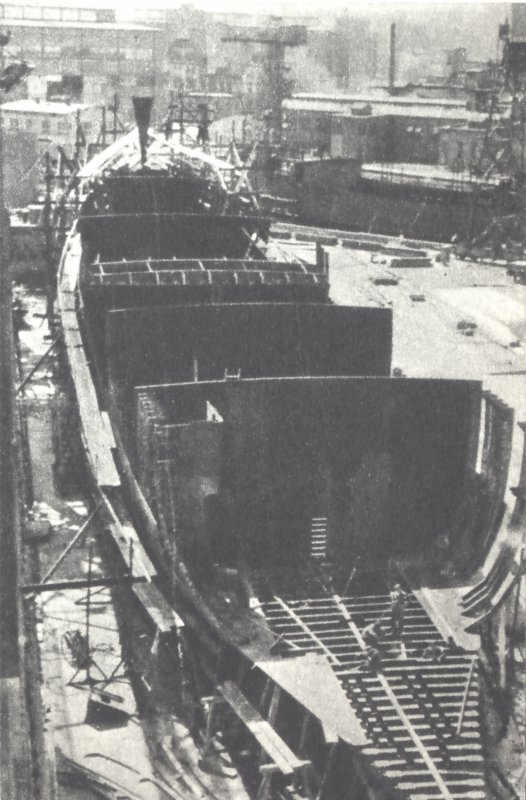 Seryjny B-30 na pochylni.